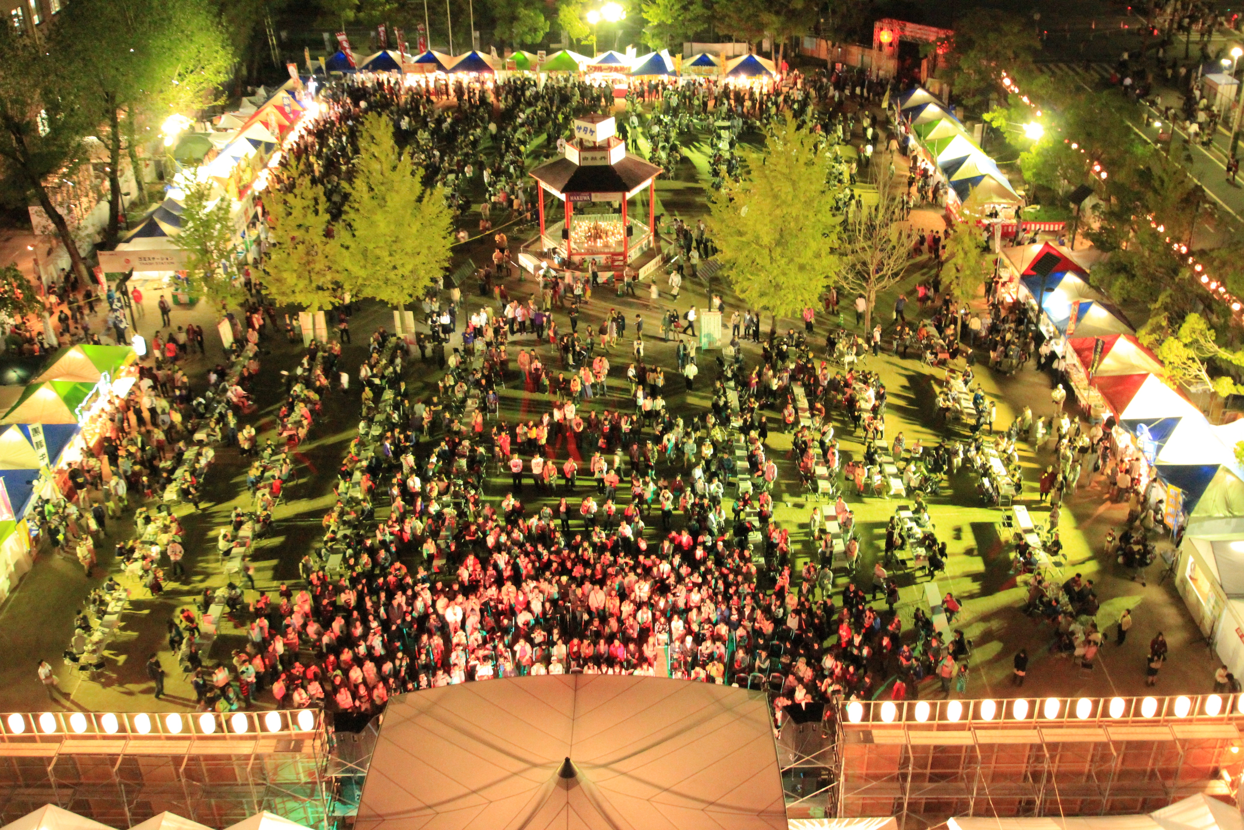 酒まつりの夜（西条町、2013年10月）